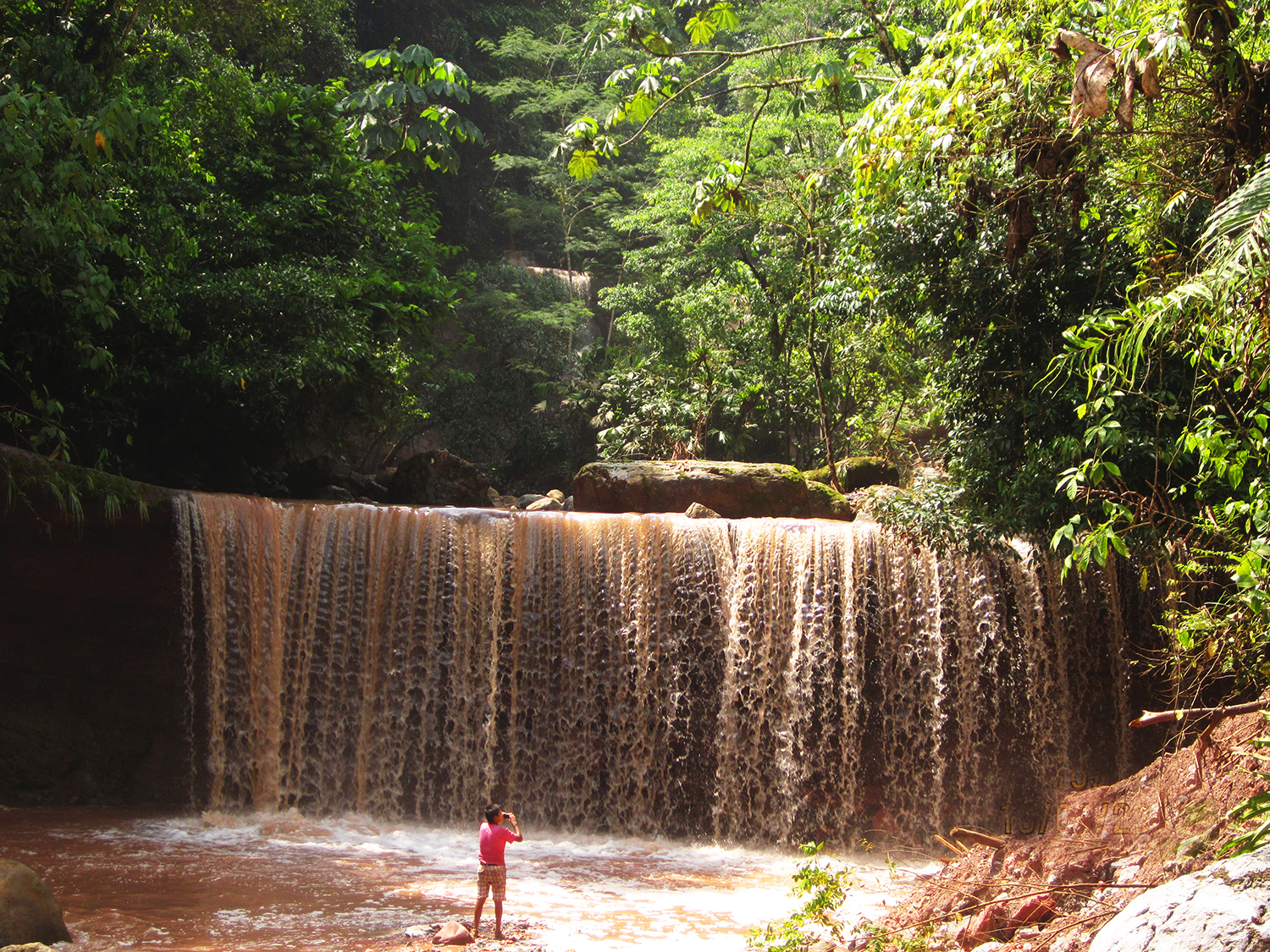 Vista panorámica de la Cascada Cortina